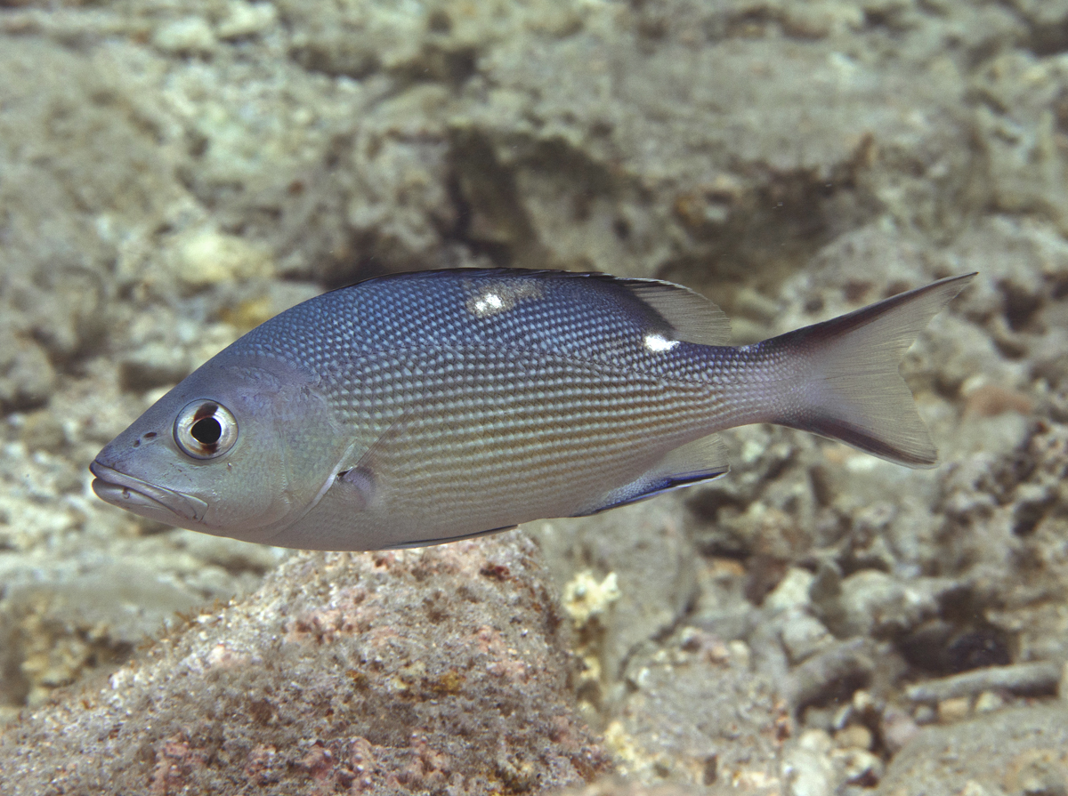 Un vivaneau chien rouge (Lutjanus bohar) à la Réunion.